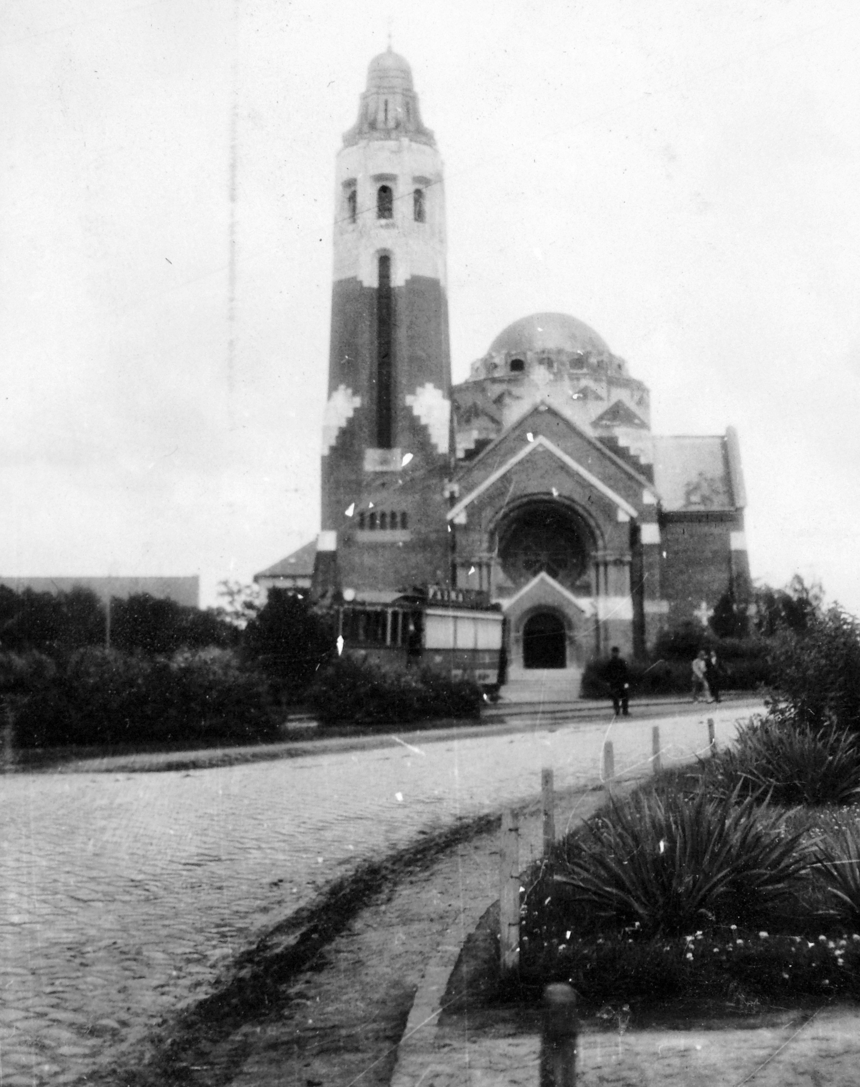 a görög katolikus templom az Attila téren. Location: Hungary, Debrecen Tags: neobyzantine art, Greek Catholic Title: a görög katolikus templom az Attila téren.